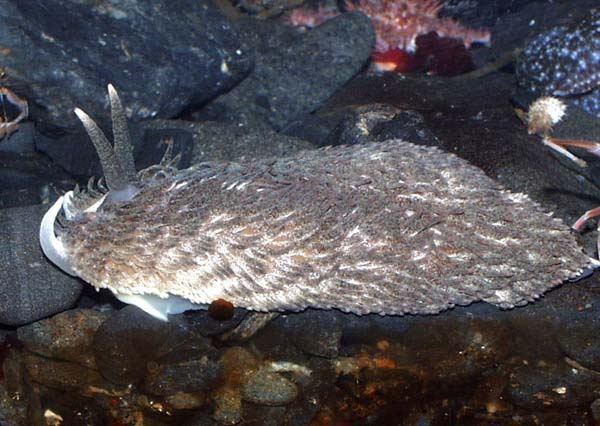 shag-rug Aeolis, Aeolidia papillosa